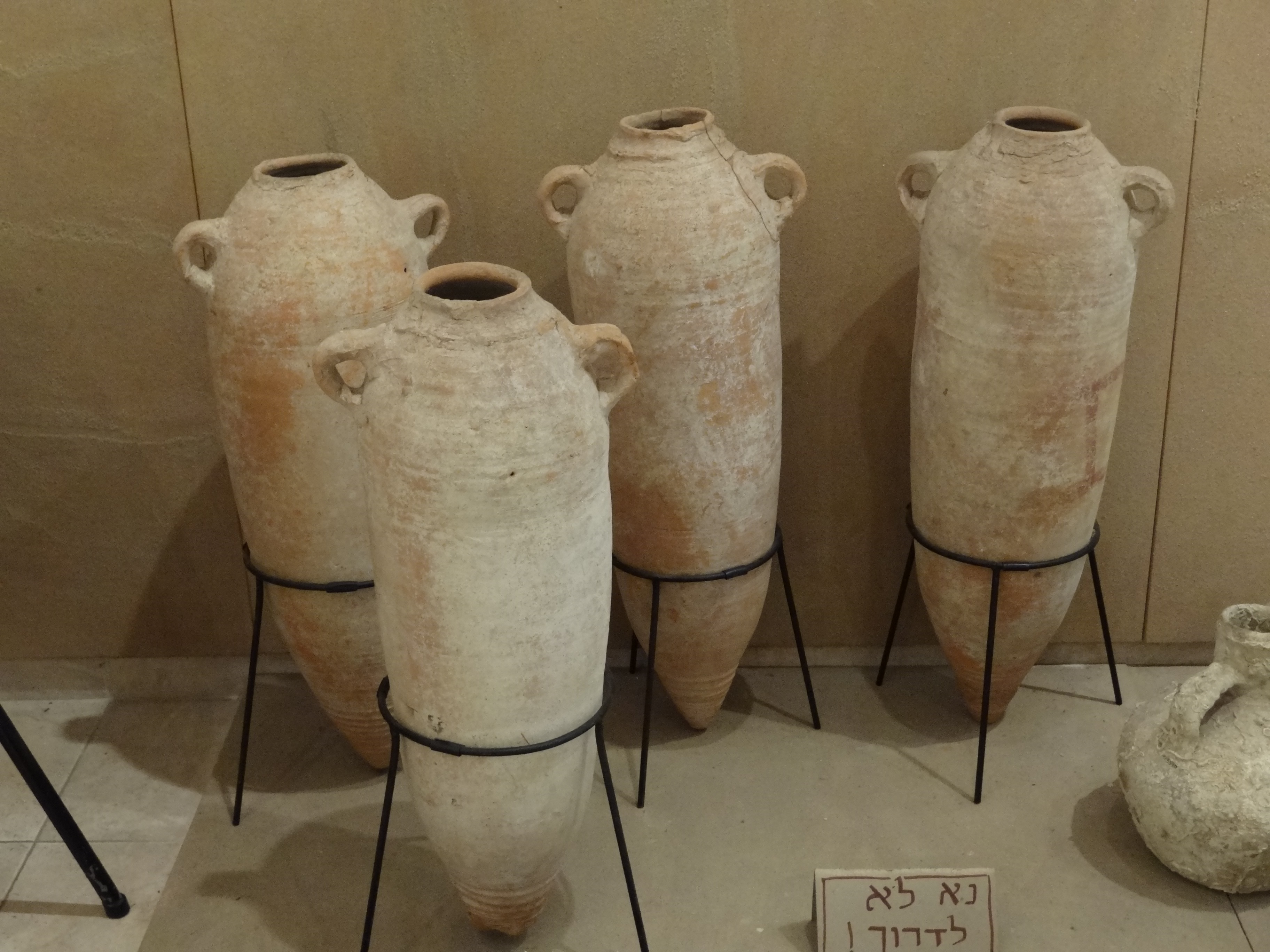 Archaeological Museum Beit Miriam in kibutz Palmahim, Israel מוזיאון בית מרים - הים ומלואו" הוא מוזיאון לארכאולוגיה השוכן בקיבוץ פלמחים מעל מצוק הצופה לים. המוזיאון מתרכז בממצאים ארכאולוגים שנחפרו באזור הקרוב לפלמחים, בחלקו התחתון של ערוץ נחל שורק וממצאים שנמשו מהים בקרבת הקיבוץ. קנקני עזה, מתוך מצבור קנקנים מהתקופה הביזנטית ששימשו לאיחסון יין. נמצאו בסמוך ליבנה ים